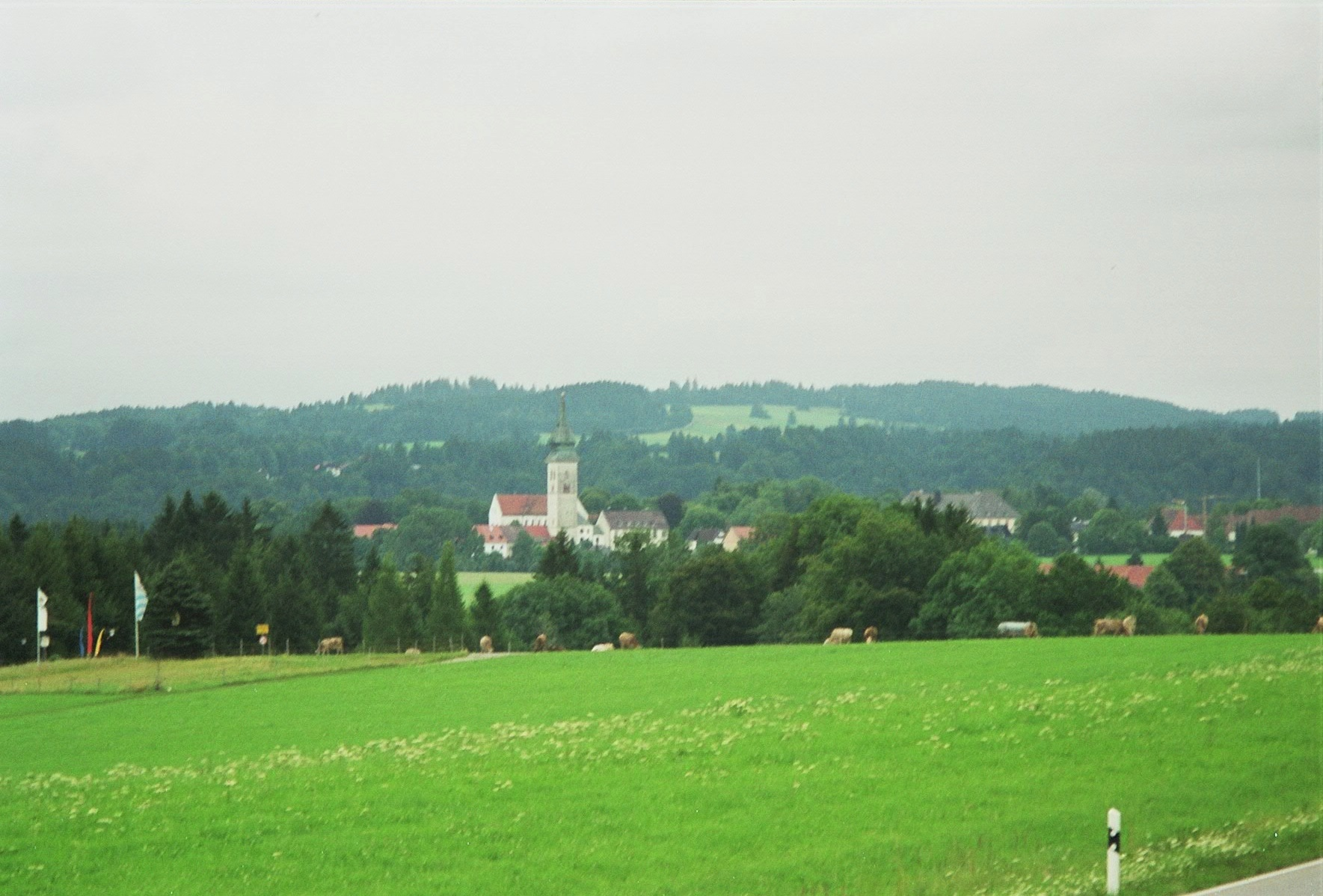 Der Blick auf Rottenbuch, Bayern, Deutschland von der Bundesstraße B 23 kurz vor dem Ort